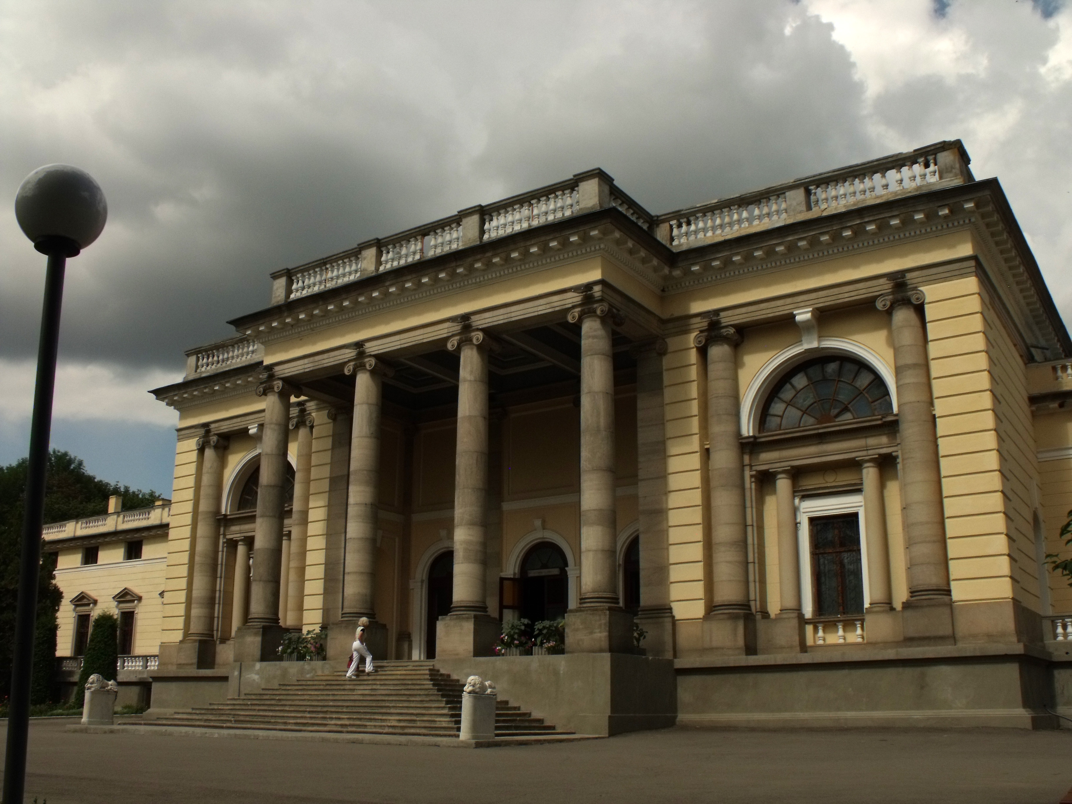 Палац княгині М.Щербатової: Вінницька область, Немирівський район, м. Немирів, вул. Шевченка,16